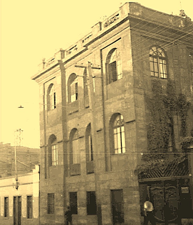 El Colegio San Luis de Antofagasta, 1916